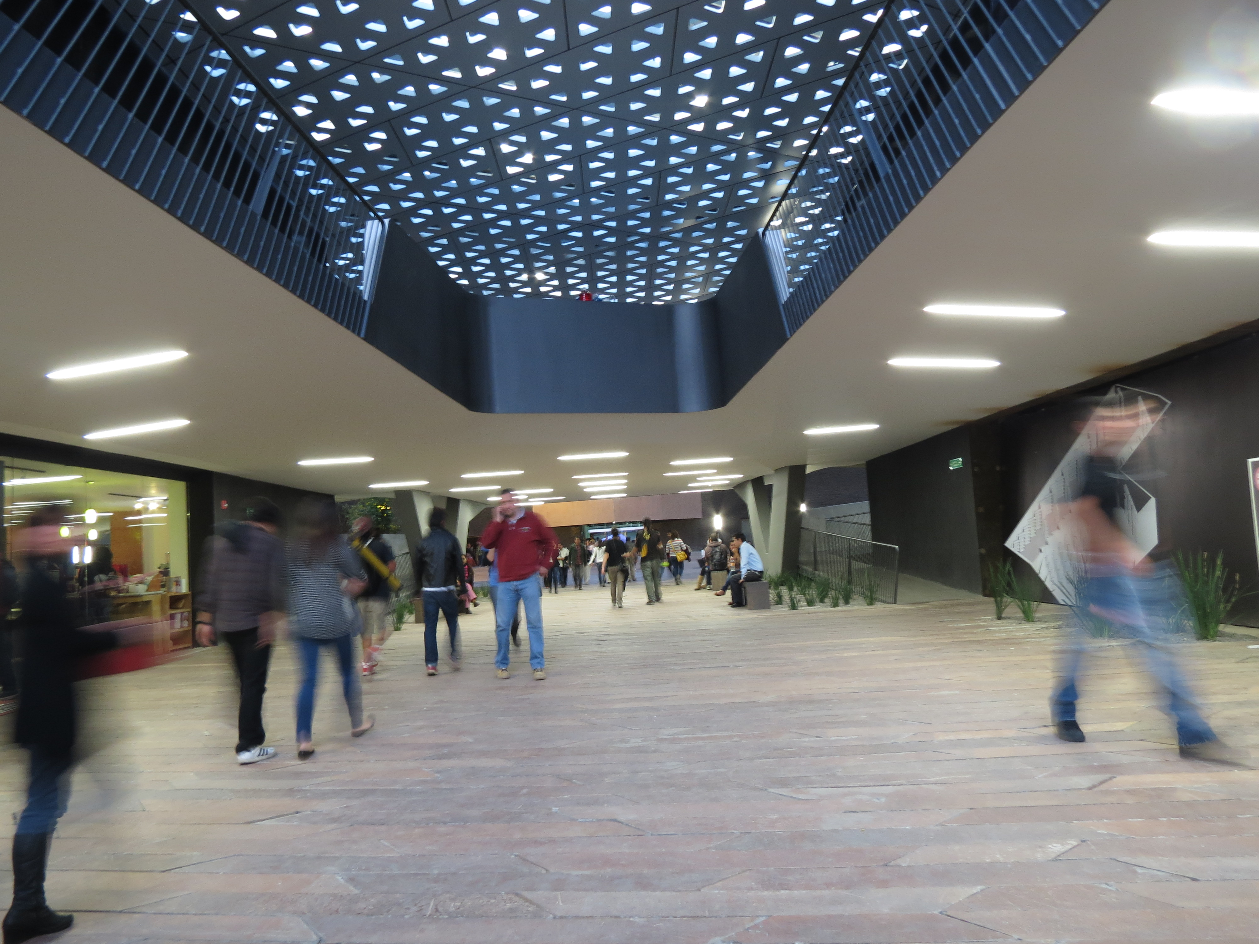 Cineteca Nacional por dentro